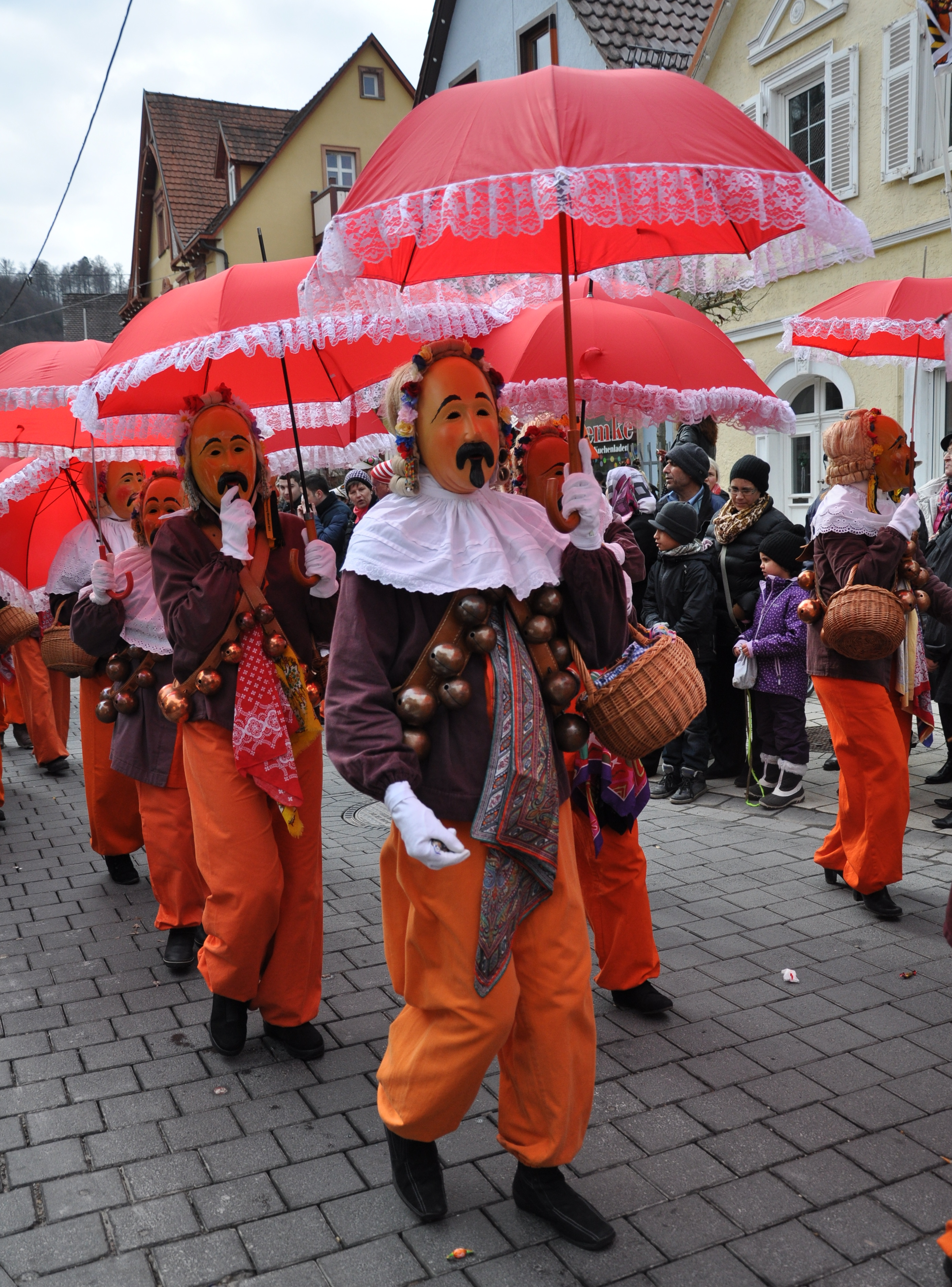 Oberndorf am Neckar, Narrensprung am Fasnetsdienstag nachmittag 2014, Hansel